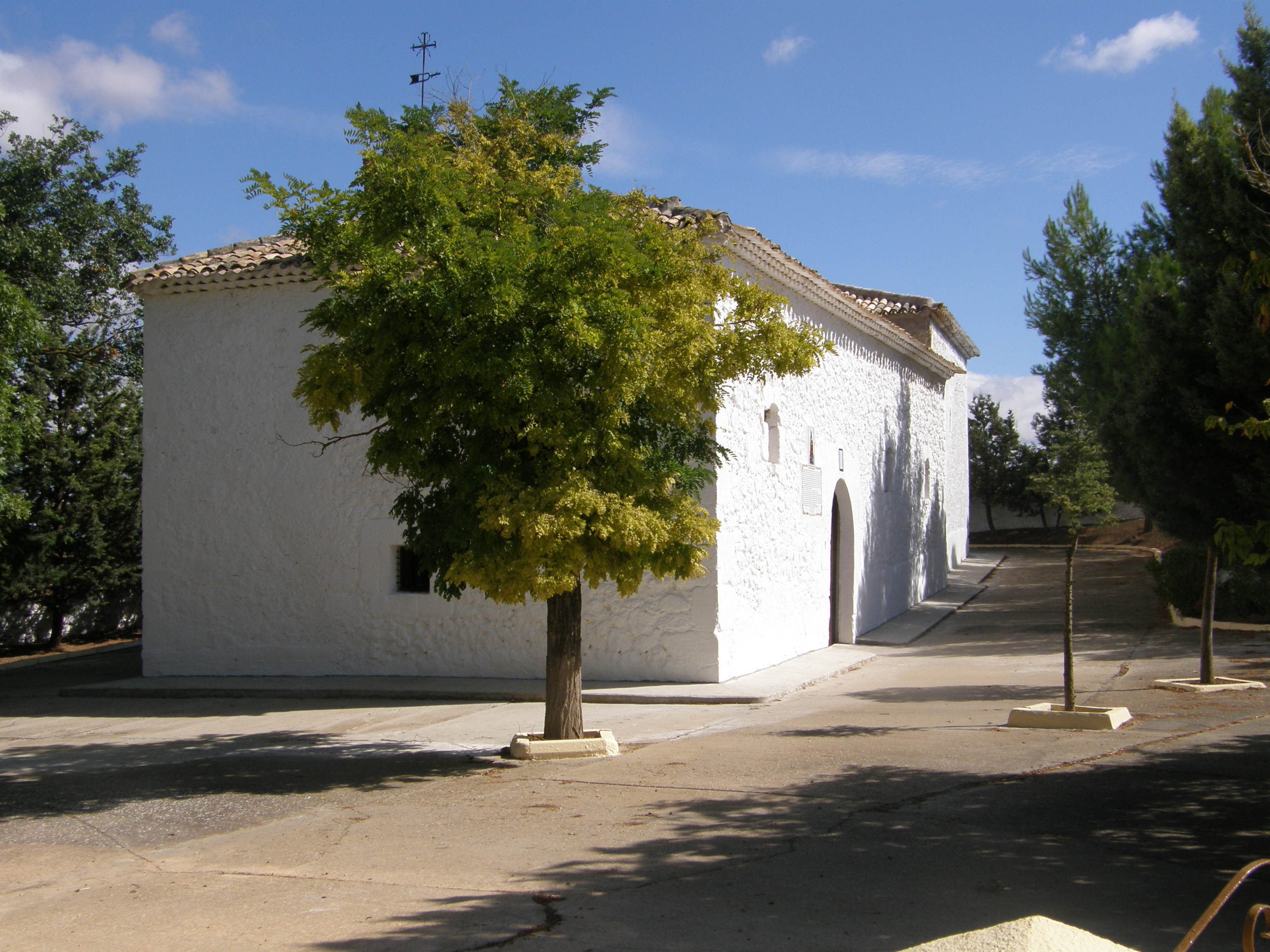 Ermita de San Bartolomé en La Almarcha (Cuenca)